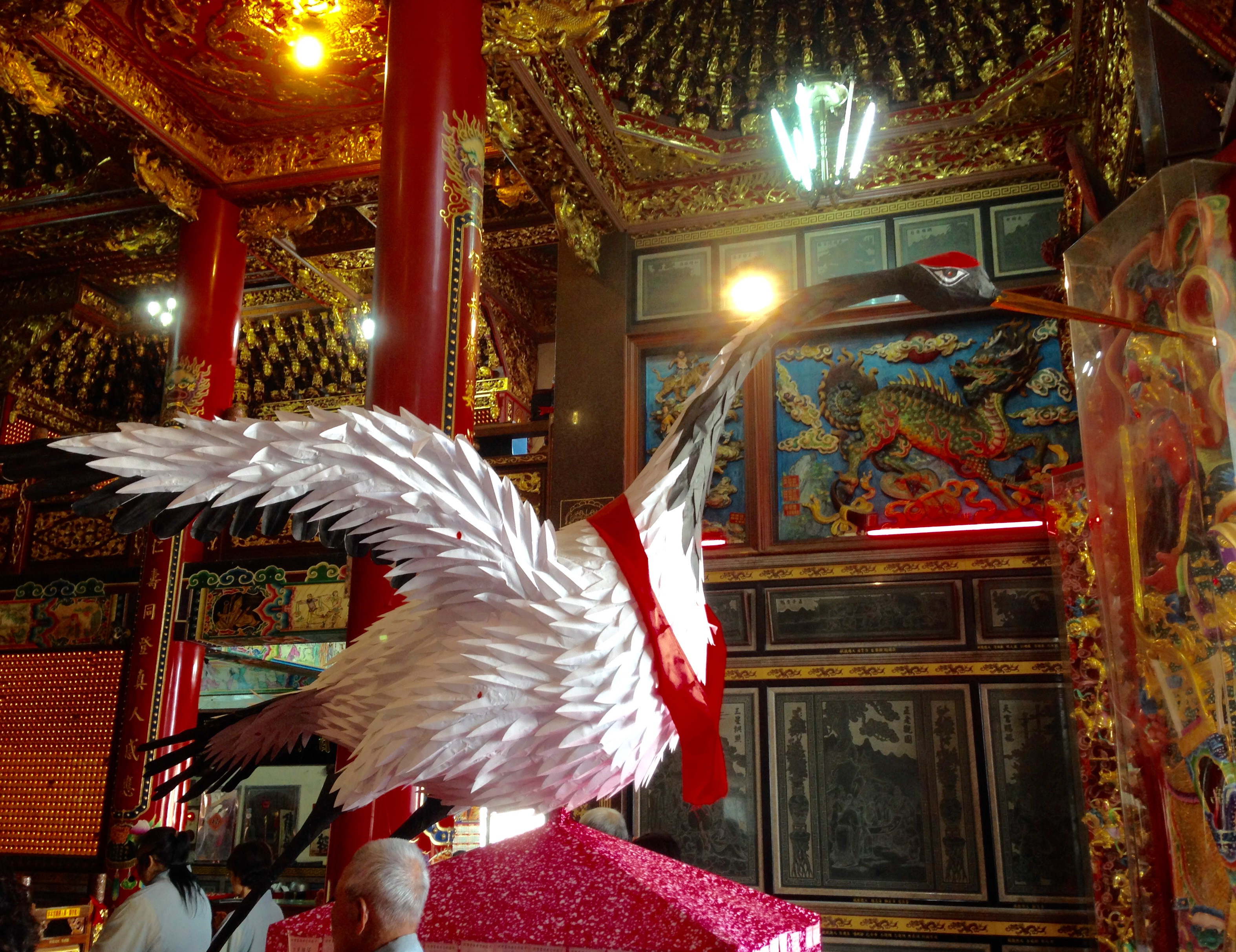 北勢寮保安宮紙紮白鶴